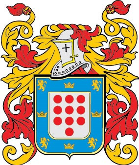 Las 10 piezas al centro son la característica principal del escudo de armas.